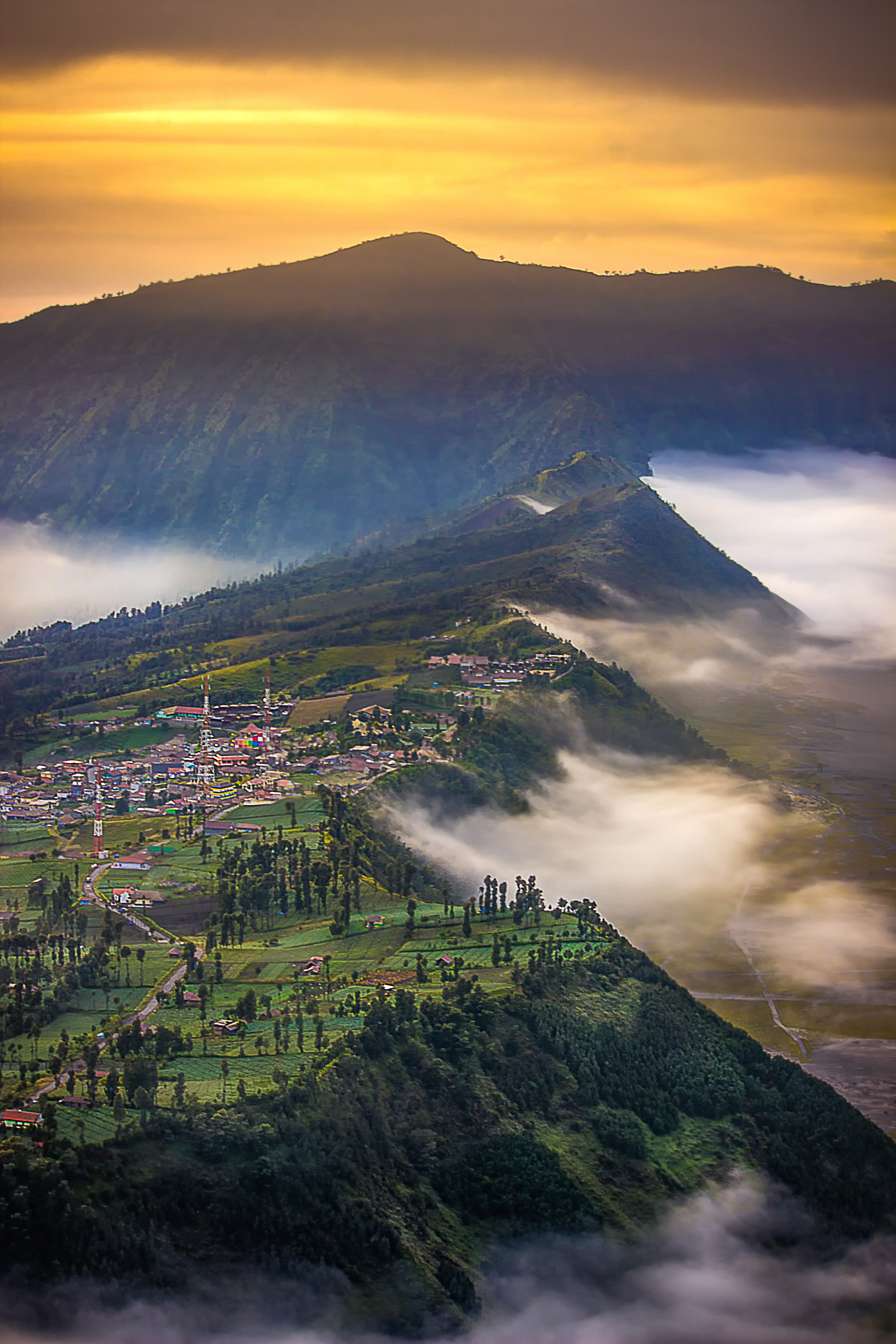 keindahan kabut di pagihari di cemoro lawang , probolinggo , jawa timur